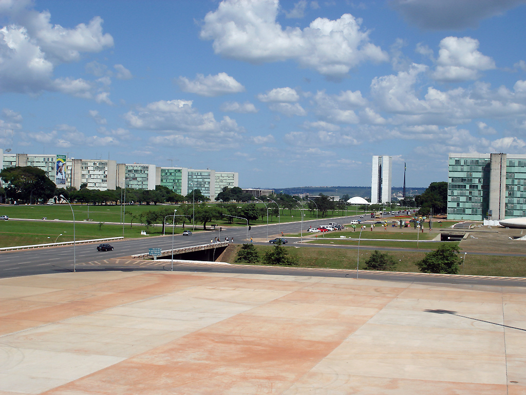 Esplanada dos Ministérios